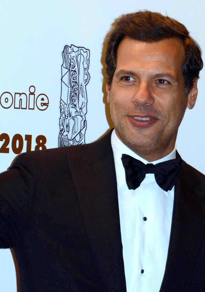 Laurent Lafitte à la cérémonie des César du cinéma